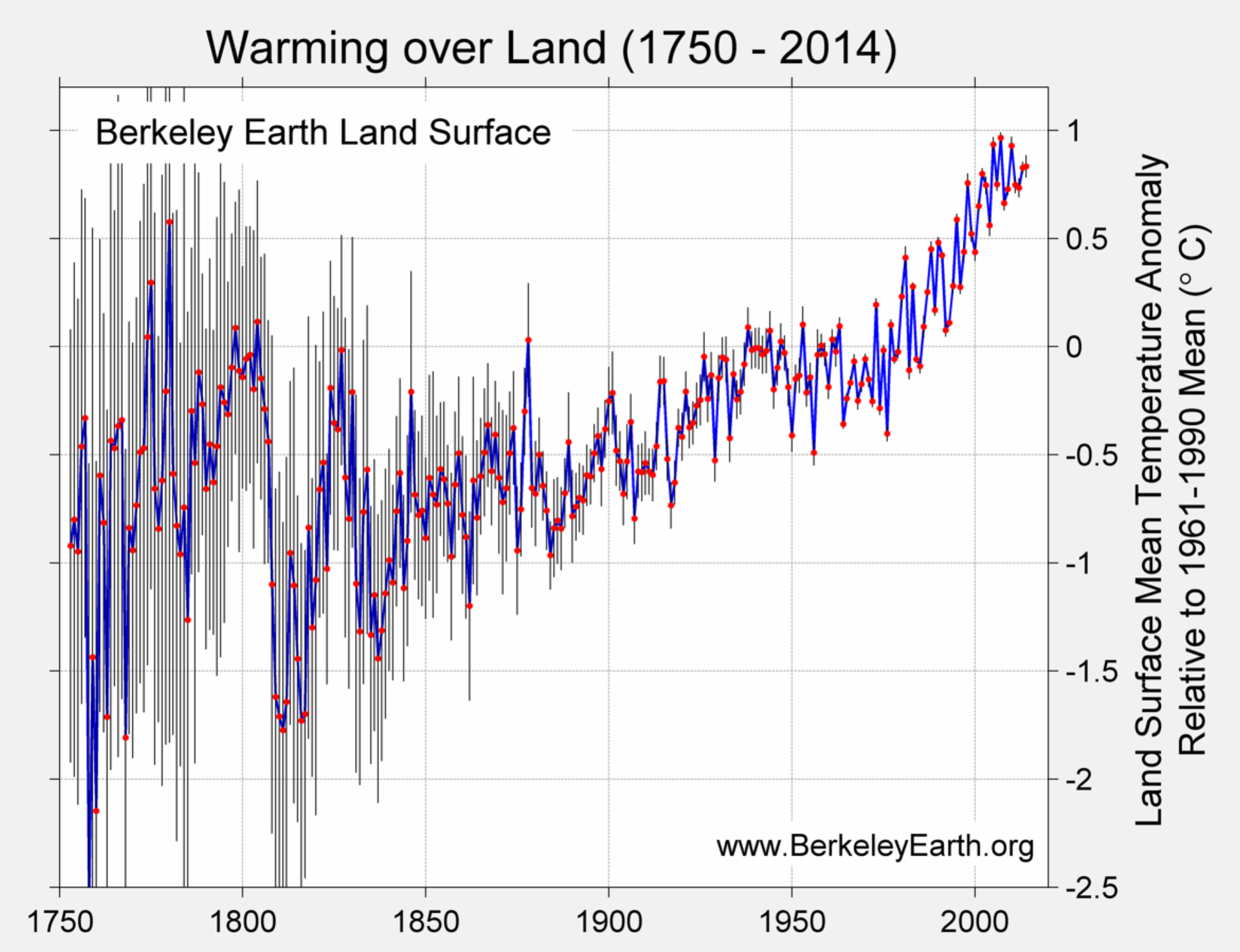 Temperaturveränderung über Landflächen rel. zu Mittelwert "1961-1990" 2007 0.966 ±0.024°C 2005 0.935 ±0.034°C 2010 0.929 ±0.042°C 2014 0.834 ±0.051°C 2013 0.827 ±0.027°C 2002 0.800 ±0.025°C 1998 0.756 ±0.045°C 2006 0.751 ±0.030°C 2011 0.748 ±0.038°C 2003 0.747 ±0.040°C